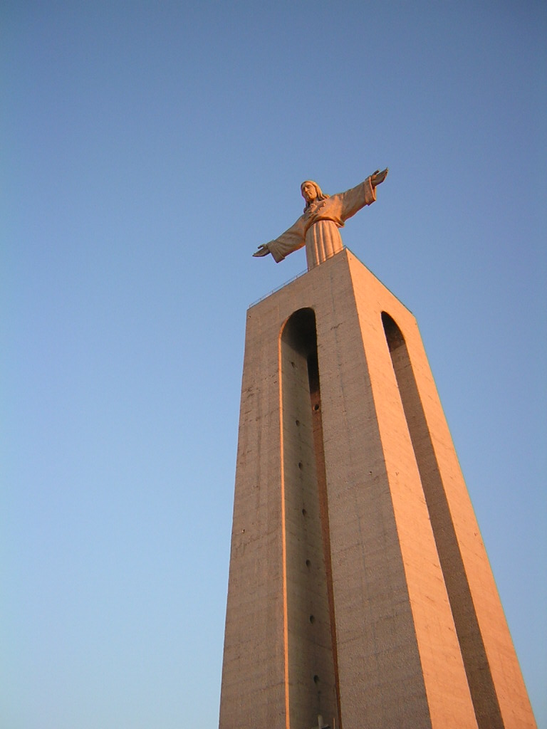 Cristo-Rei (Portugal)